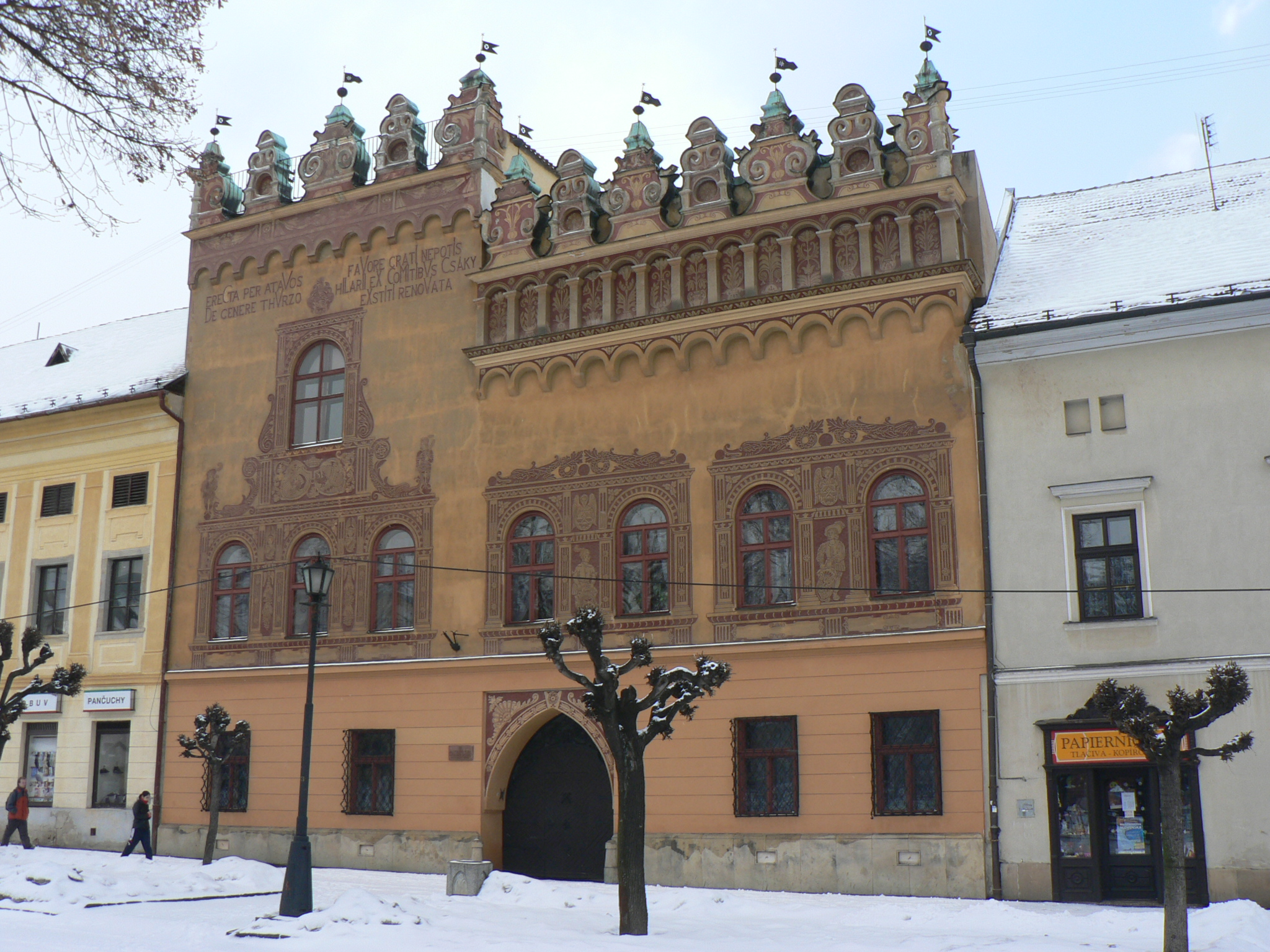 A Thurzó-ház Lőcsén (Szlovákia)